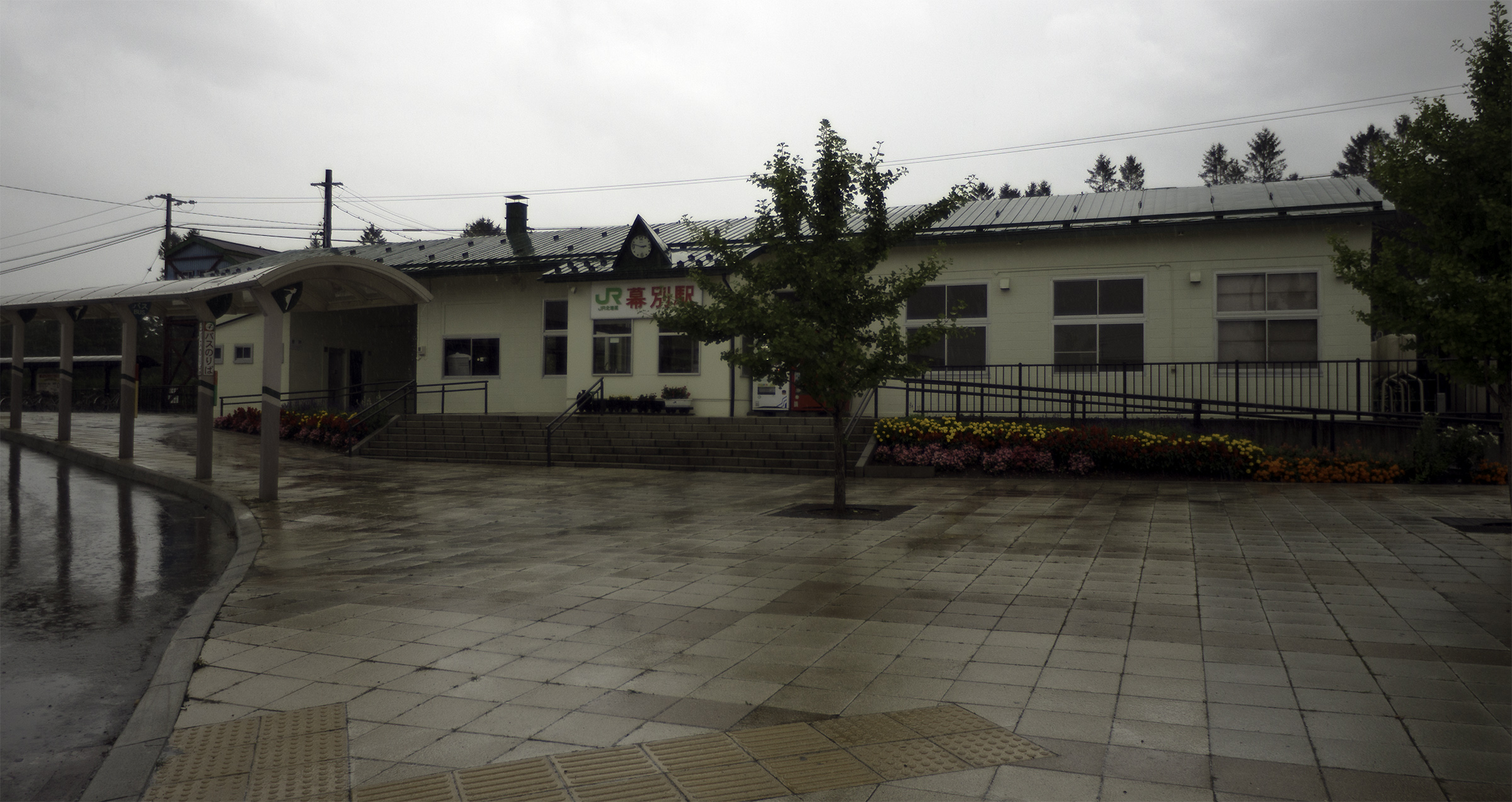 北海道旅客鉄道根室本線幕別駅駅舎